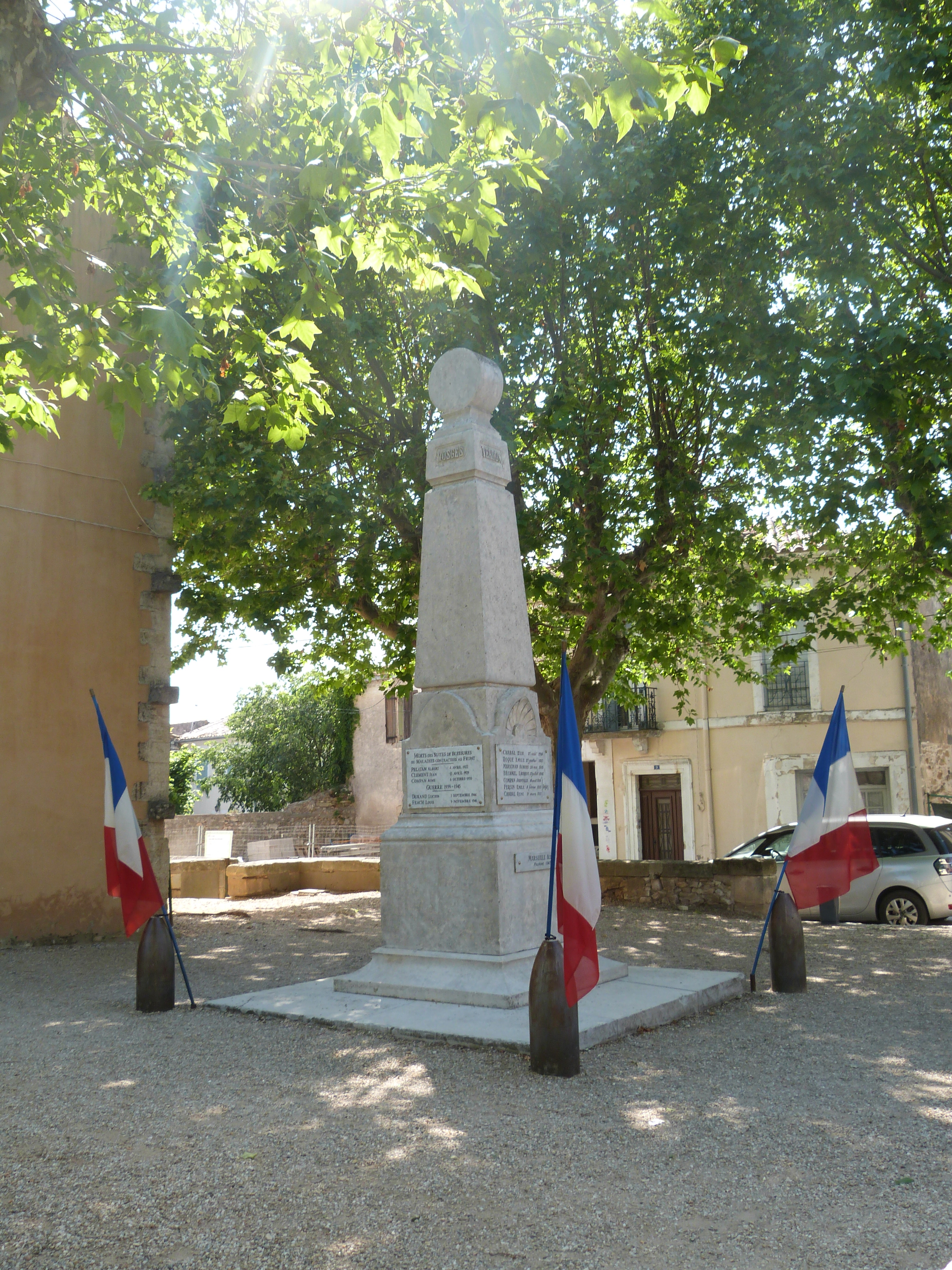 Place Marceau Dalgon, Montpezat, Gard